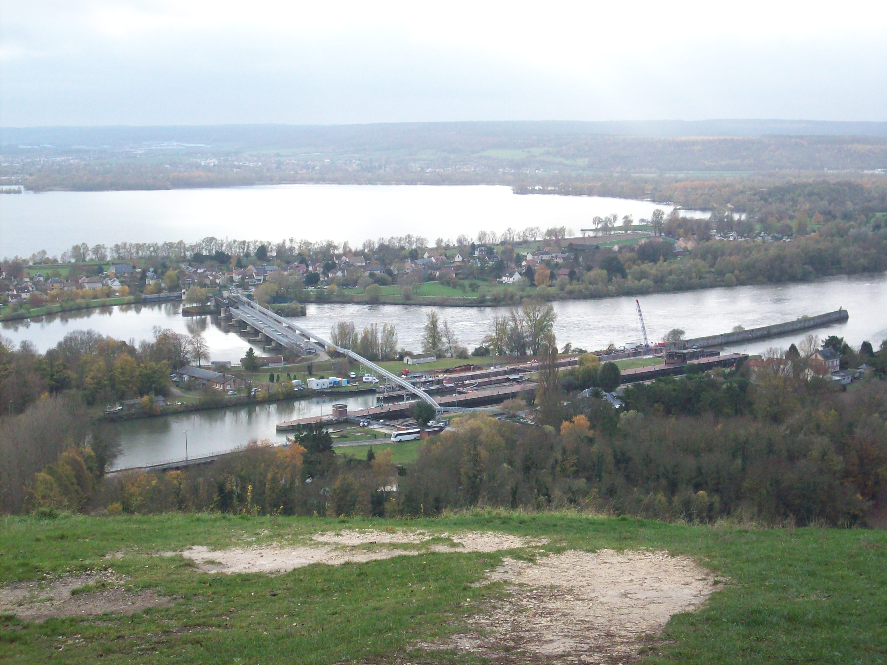 Barrage-écluses de Poses. Vue depuis la rive droite, de la côte des Deux Amants sur le territoire d'Amfreville-sous-les-Monts.